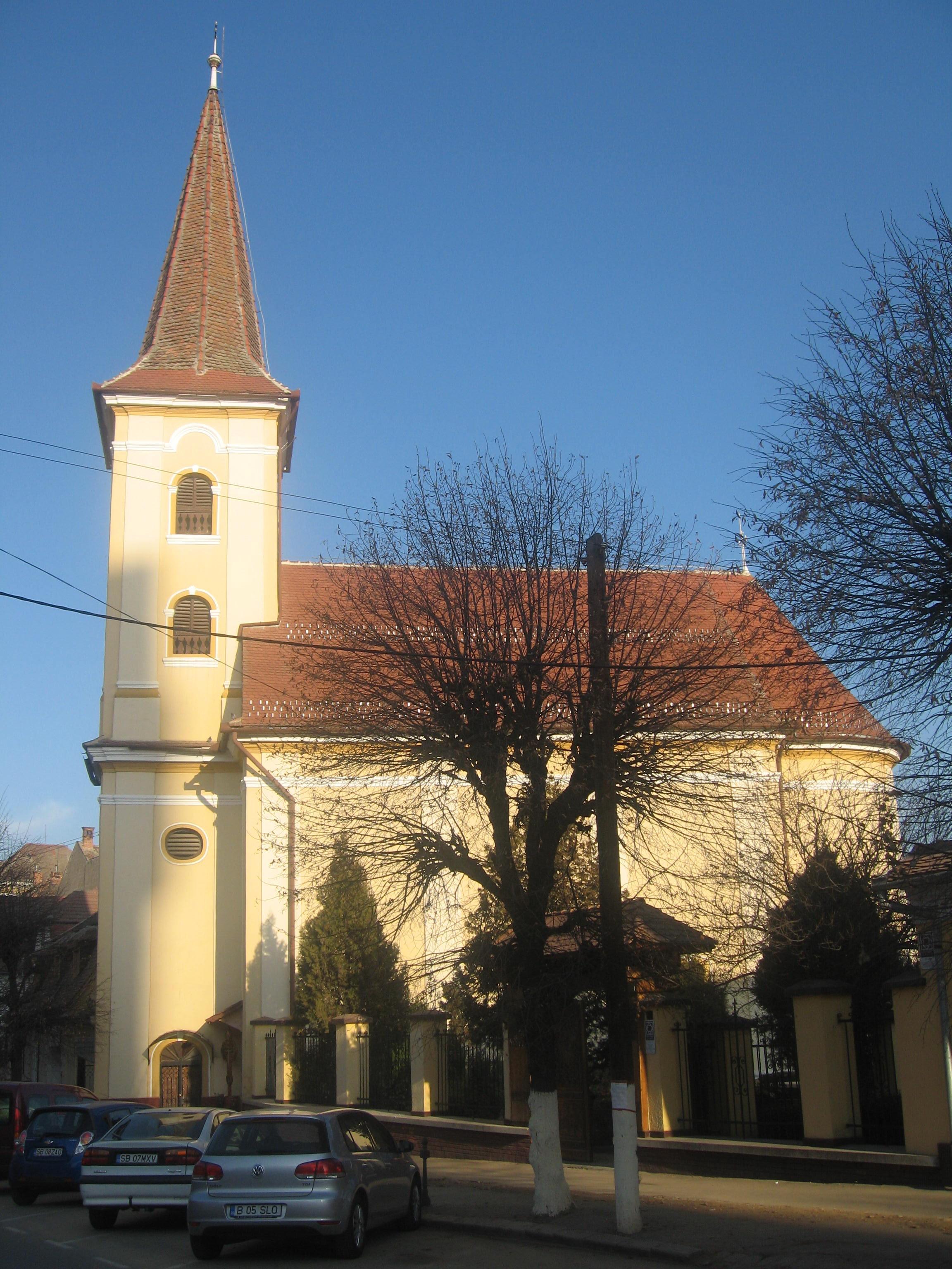 Biserica "Buna Vestire” din Sibiu 01